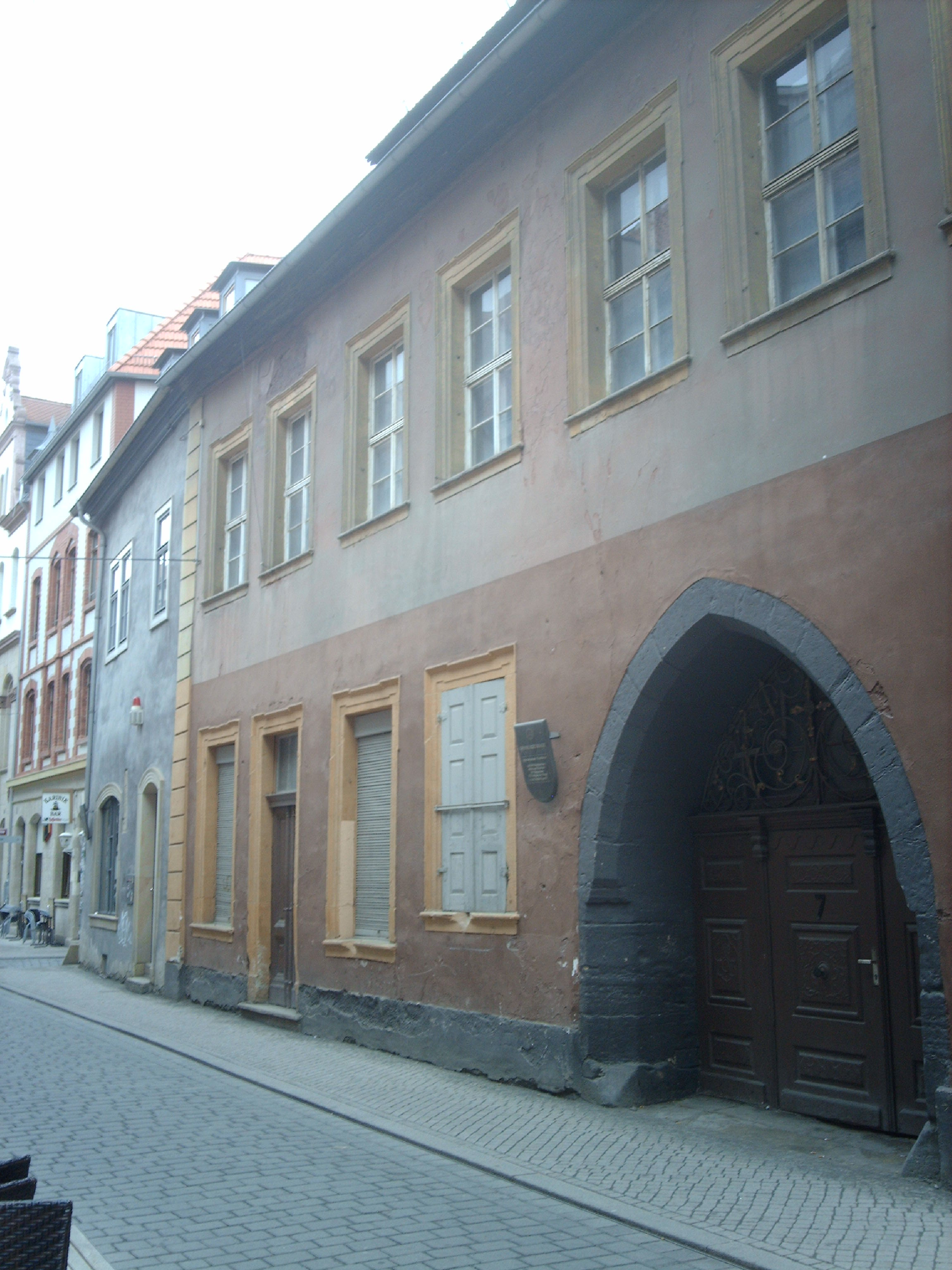 Haus Zur Großen Waage in Erfurt (Michaelisstraße 6), links anschließend das Haus Zur Kleinen WaageEsperanto: Domo Zur Großen Waage en Erfurt, maldekstre la domo Zur Kleinen Waage en Erfurt (Michaelisstraße nr. 6+7): ambaux malnovaj pesilejoj